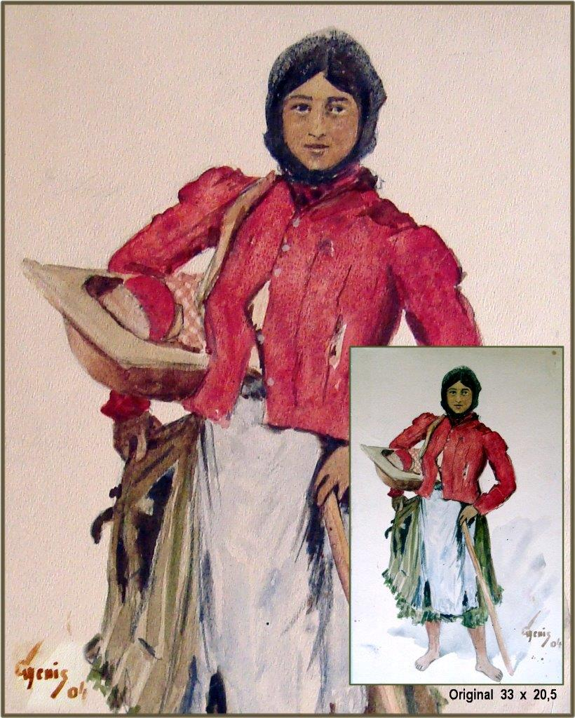 Aquarell von Hans Gyenis, "Bauernmädchen mit Brotzeitkorb" gemalt August 1904 in Csoboka